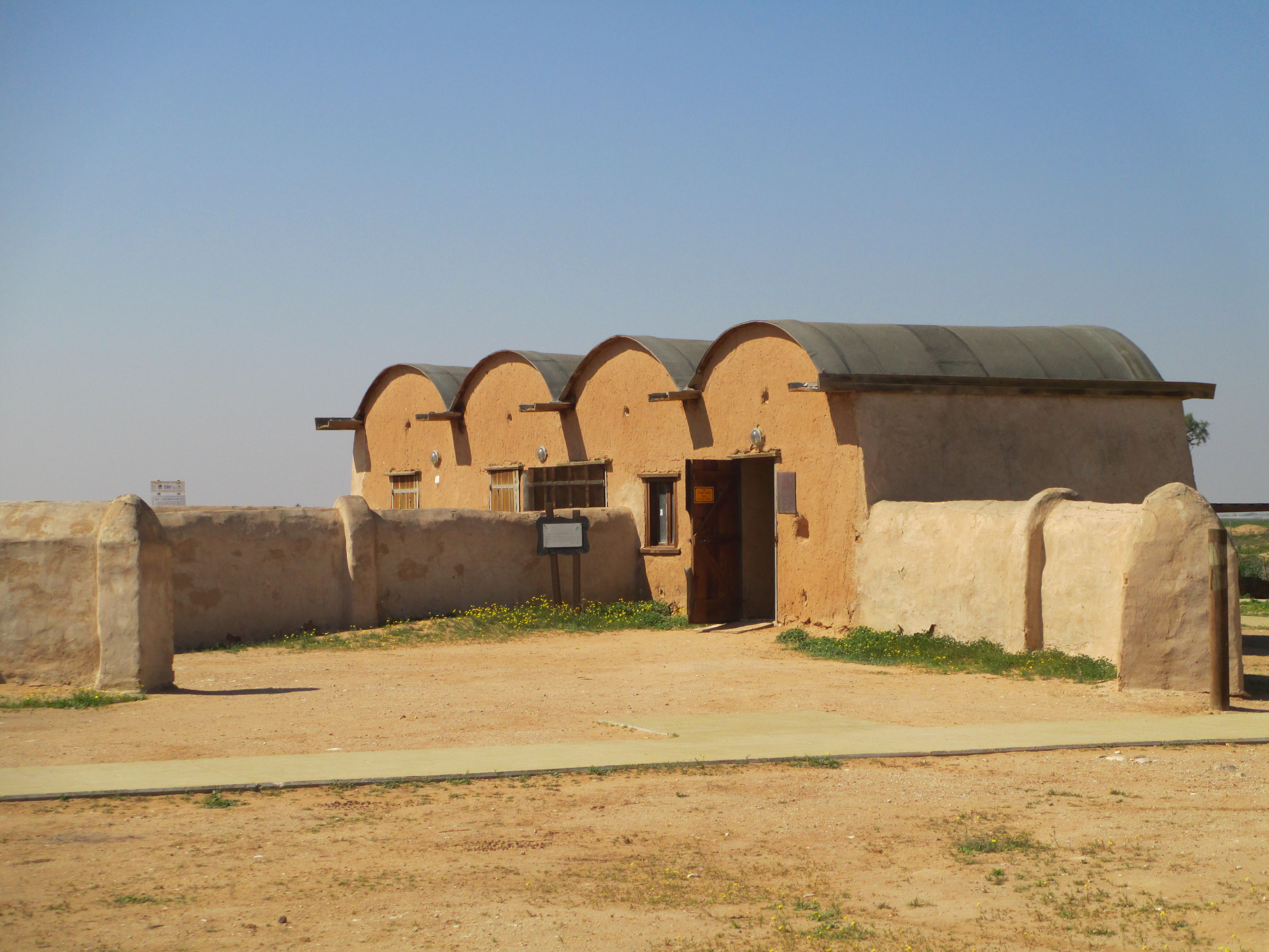 מצפה גבולות